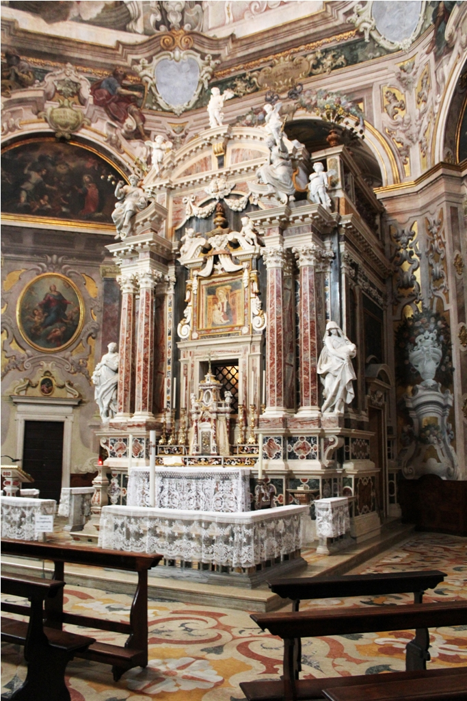 Altare - Chiesa di S. Maria della Carità - Brescia